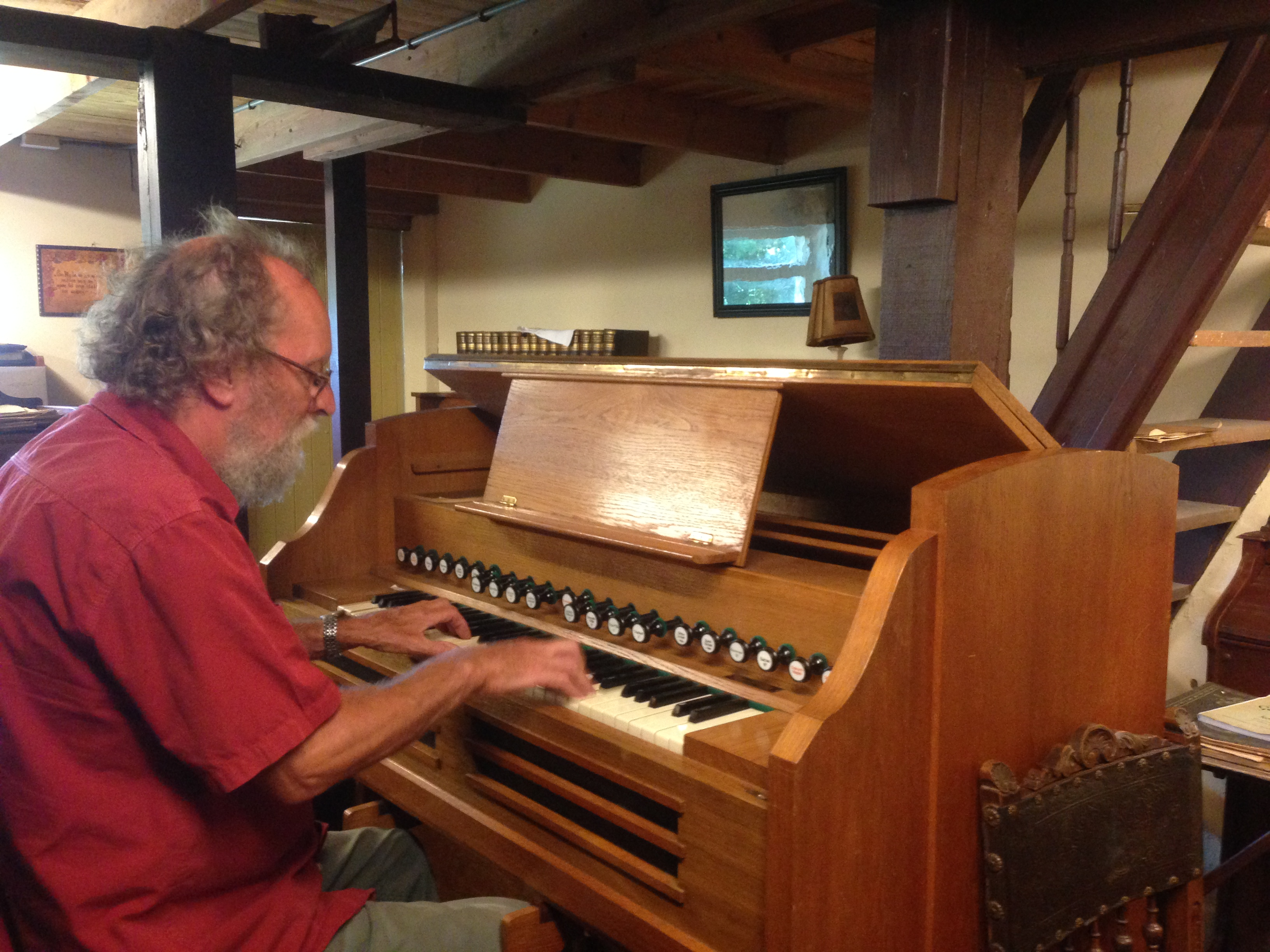 Harmonium Museum in Paasloo, Overijssel, Netherlands